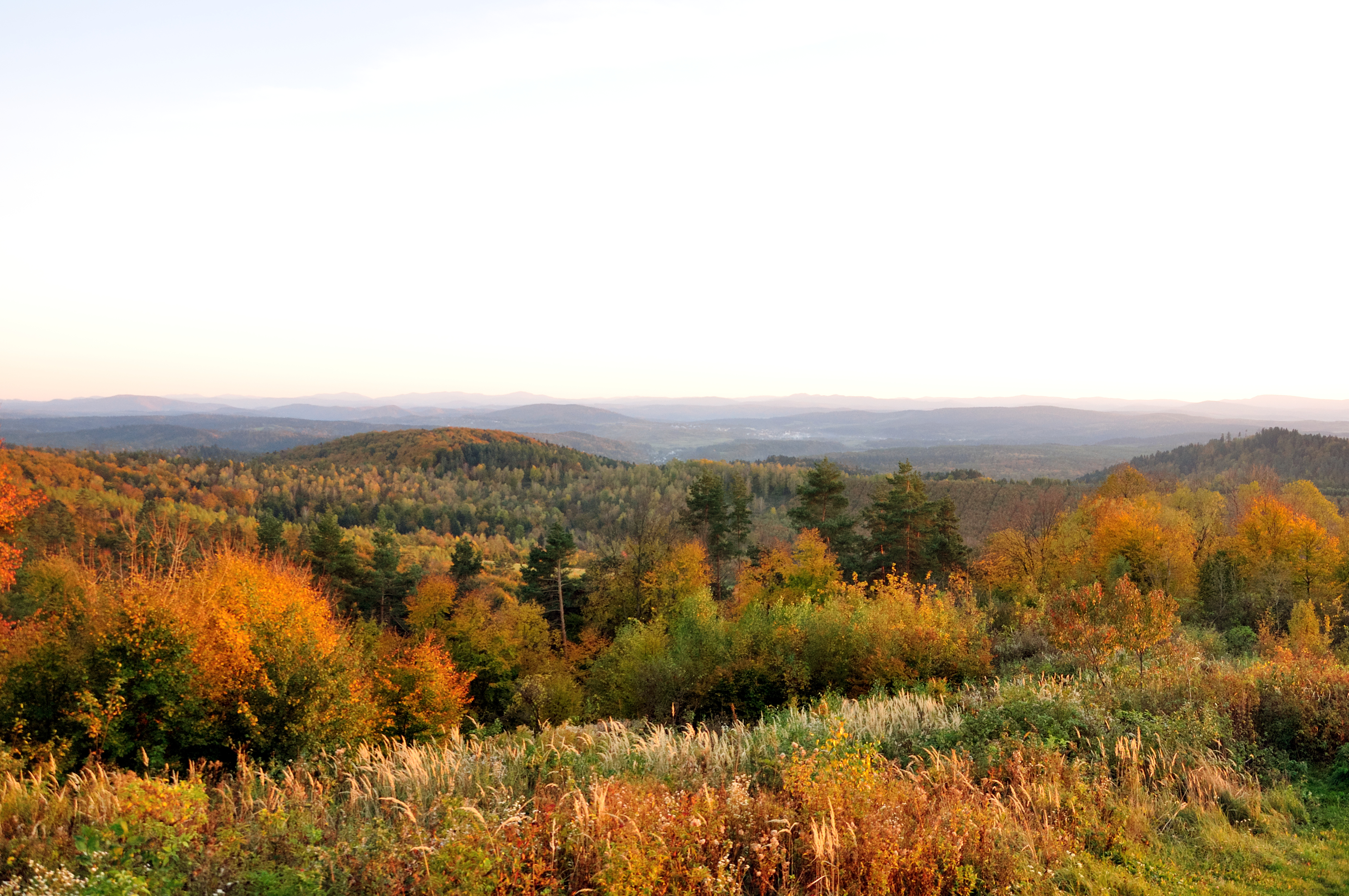 Park krajobrazowy Park Krajobrazowy Gór Słonnych.